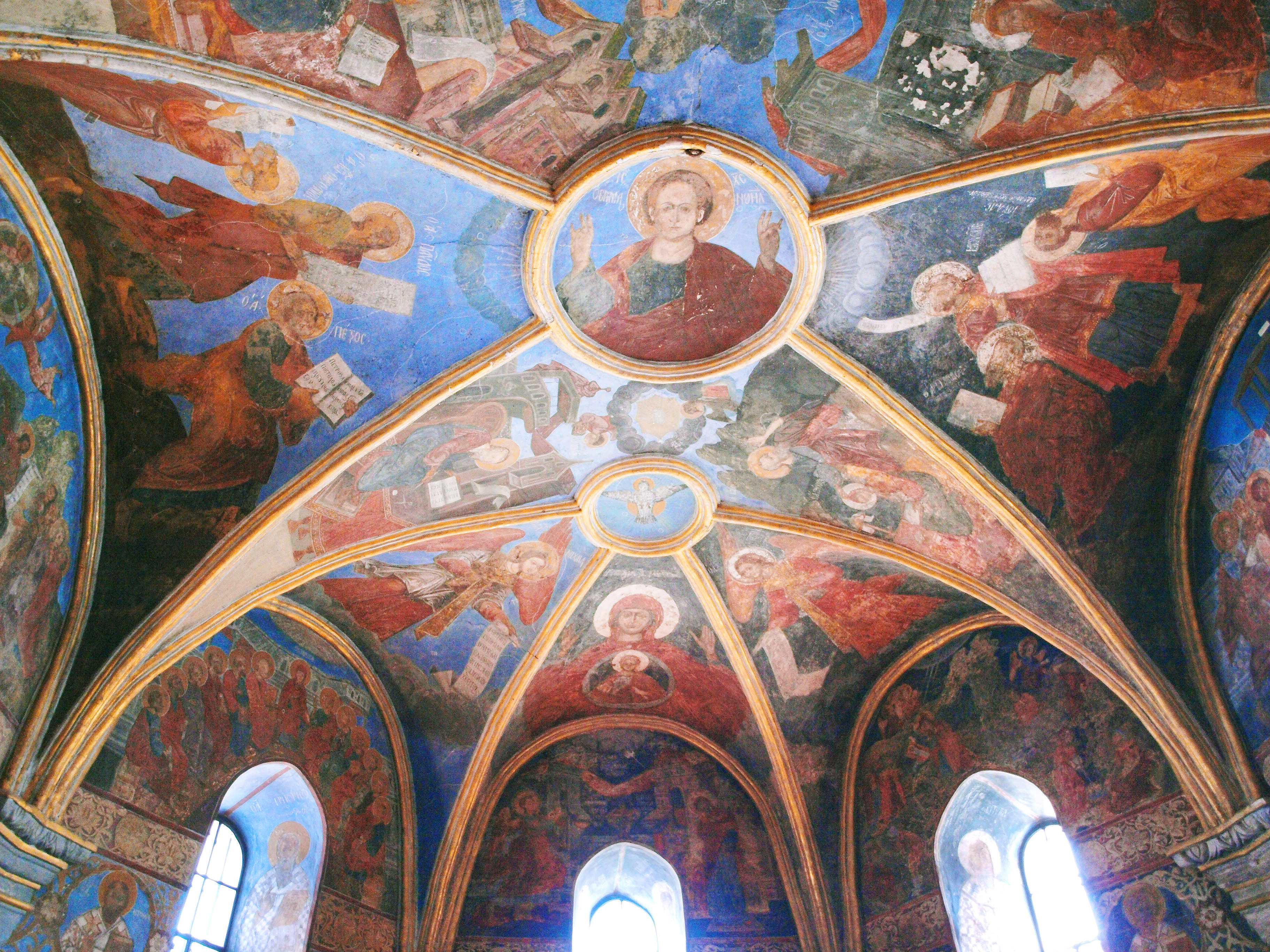 Фрески після реставрації 2017-2019 років. Церква Спаса на Берестові, Київ, вул. Лаврська, 5